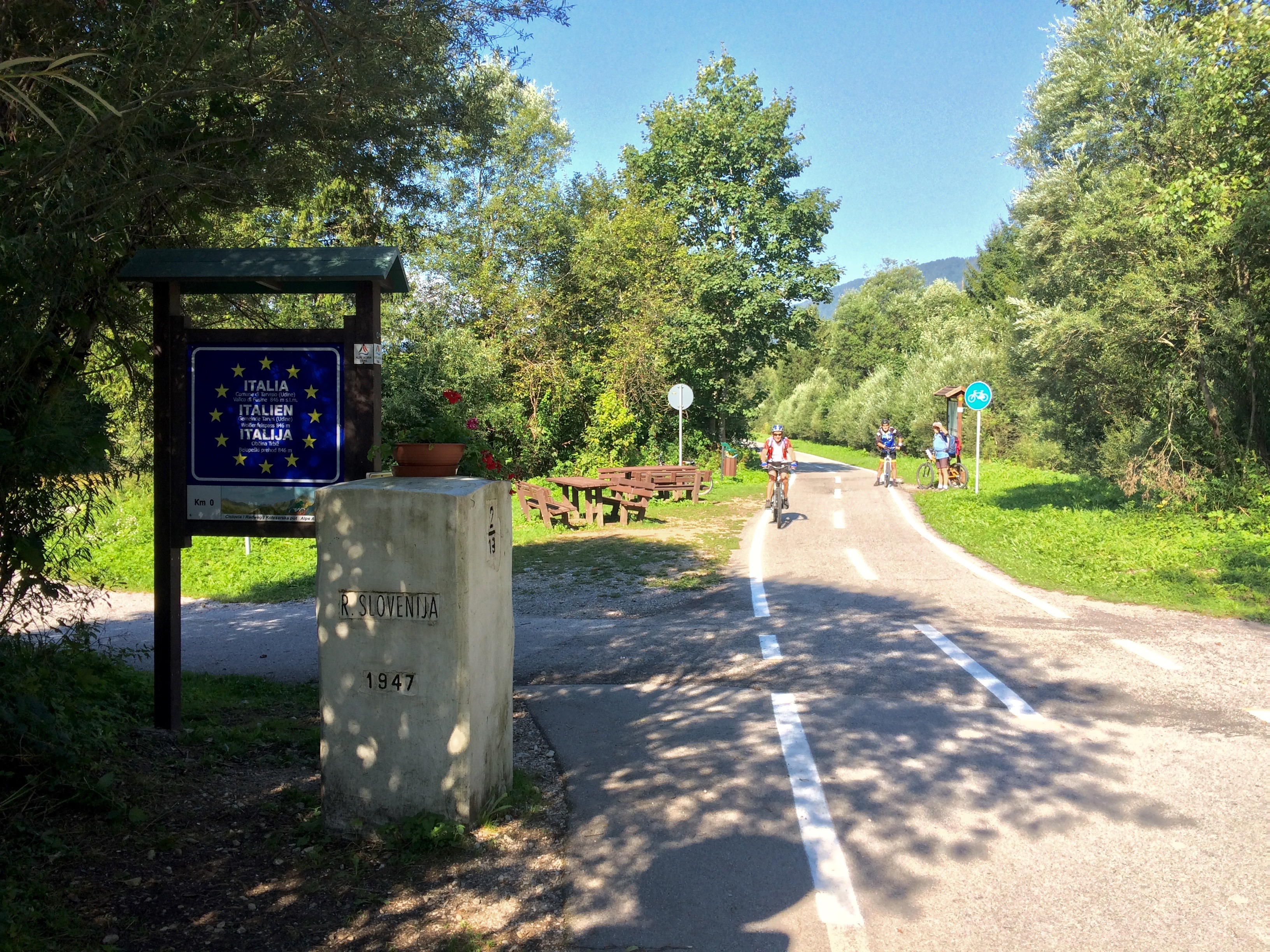 Über die Grenze nach Italien